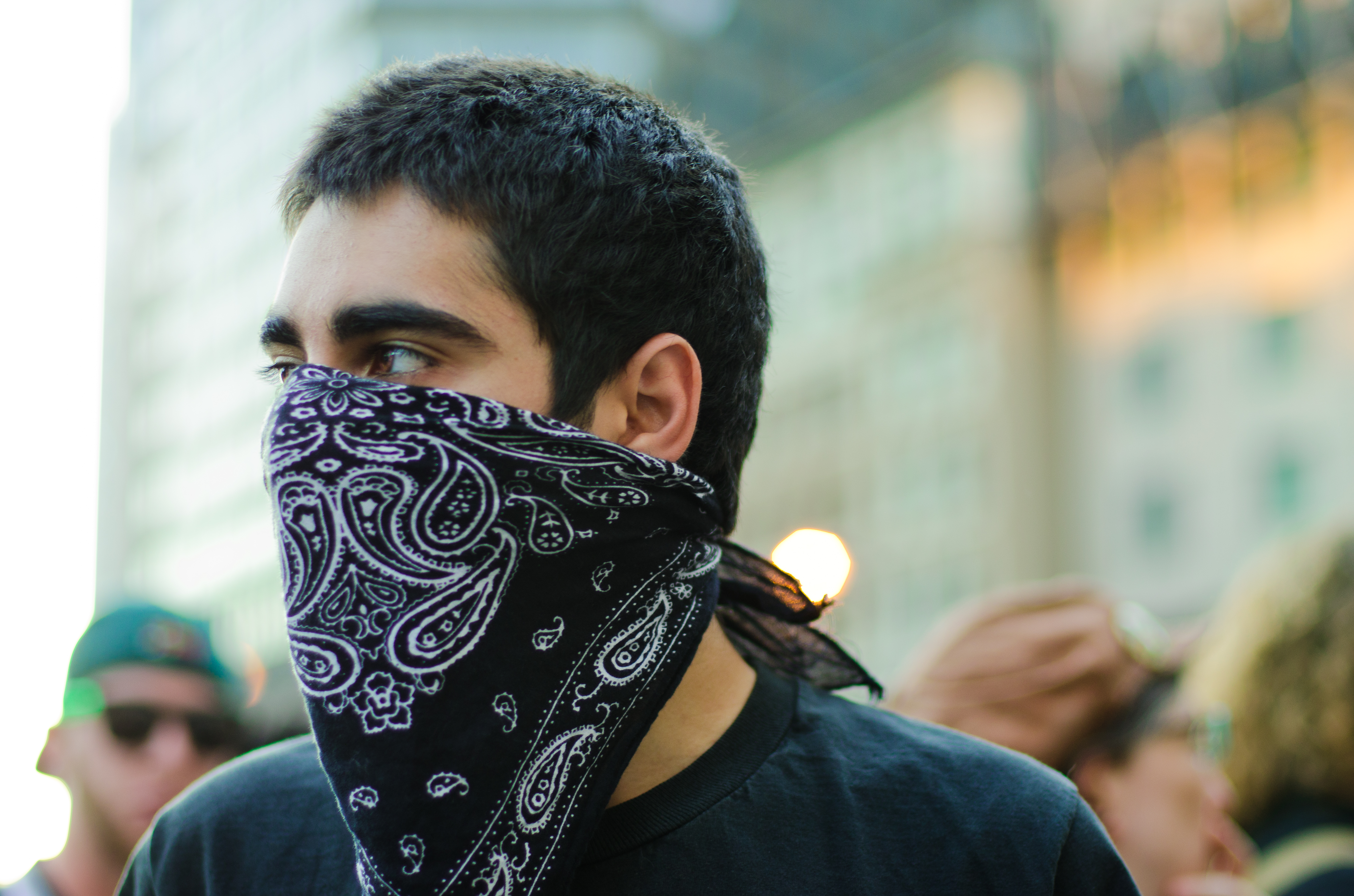 occupyboston